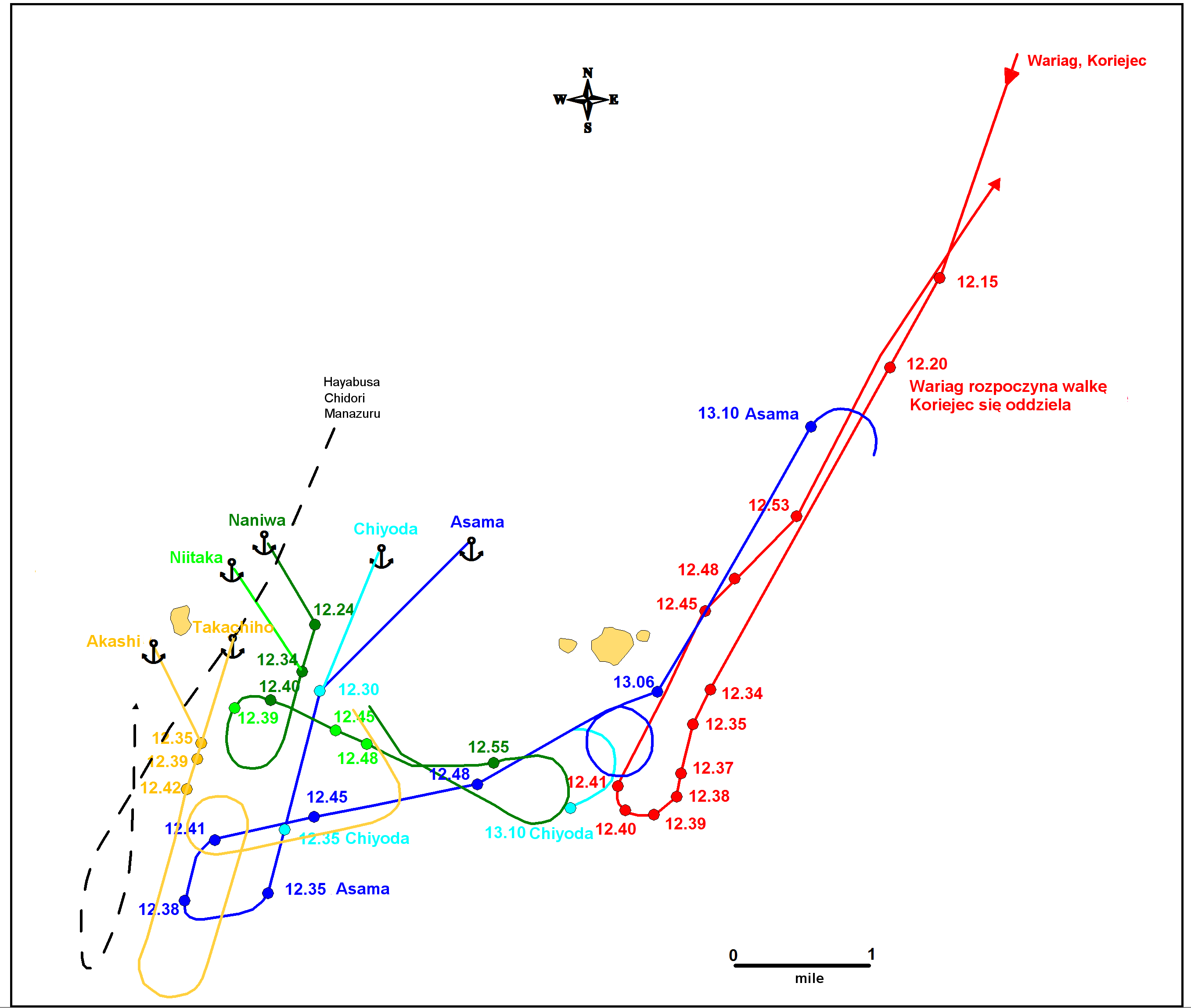 Bitwa pod Czemulpo